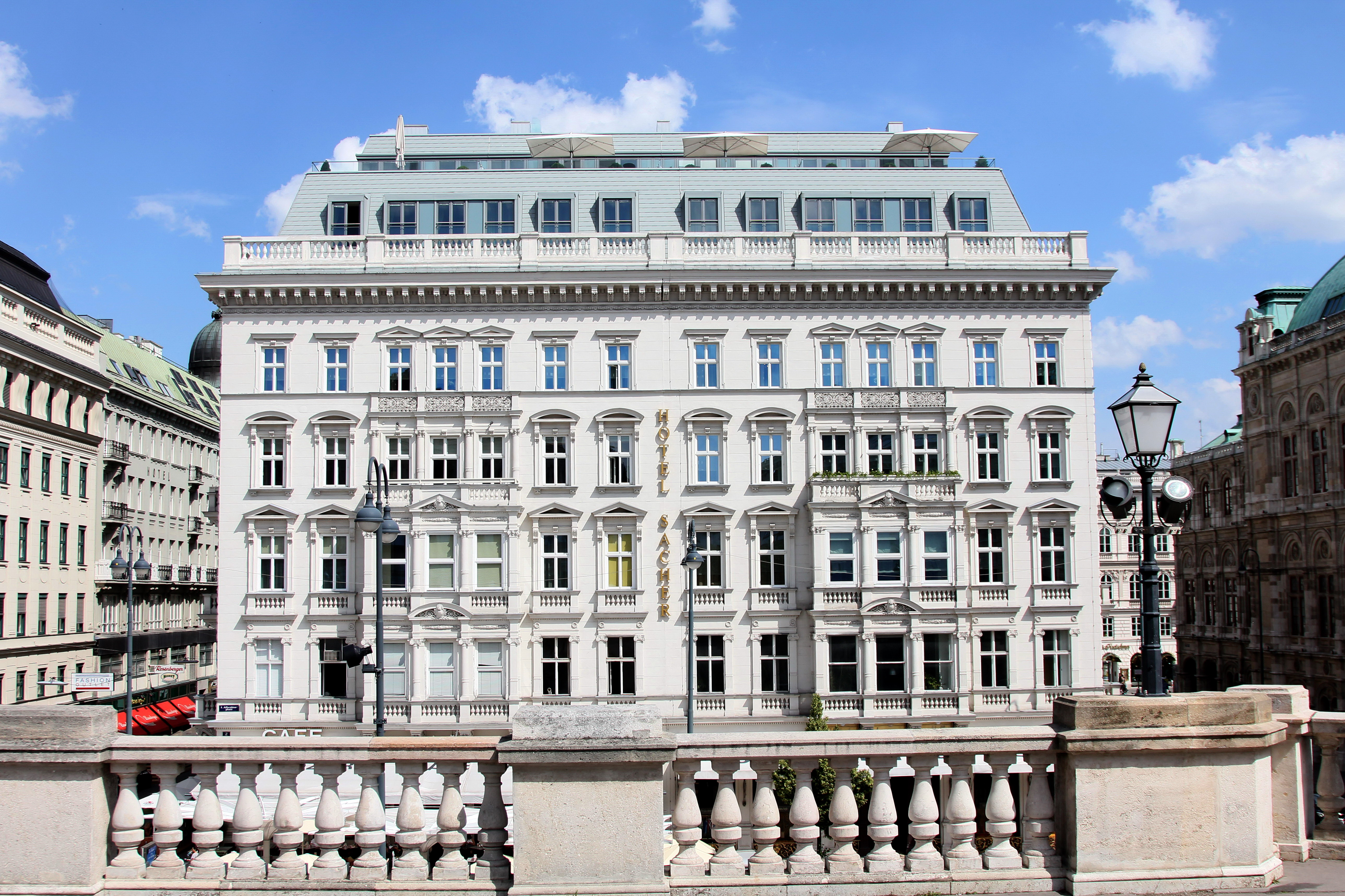 Wiedeń. Widok z tarasu Albertiny na Hotel Sacher.